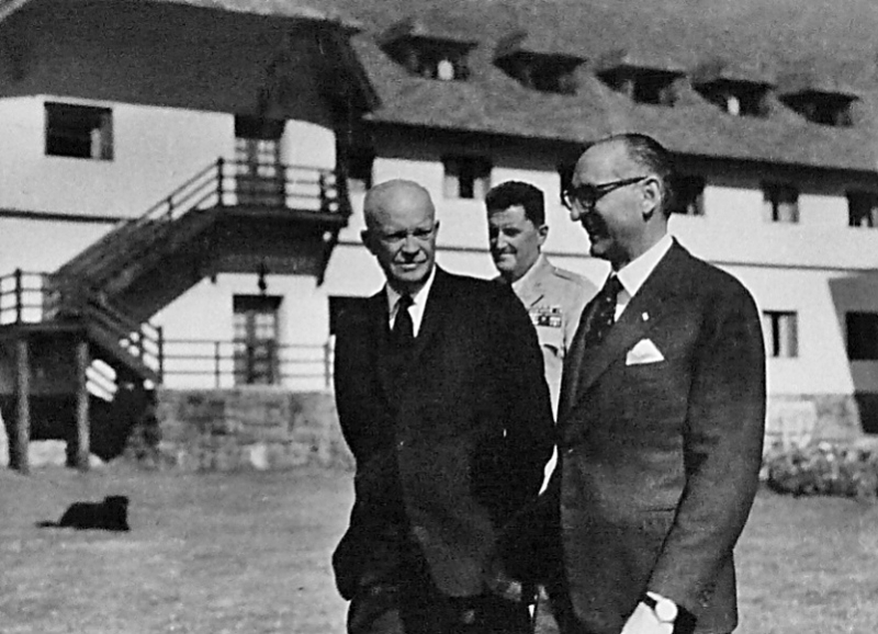 Visita de Dwight Eisenhower y Arturo Frondizi en Bariloche en 1960.